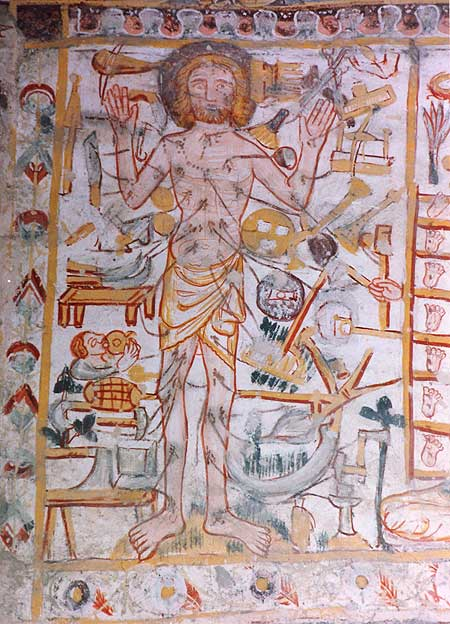 Feiertagschristus im Schiff der Kirche St. Georg, Rhäzüns, Graubünden